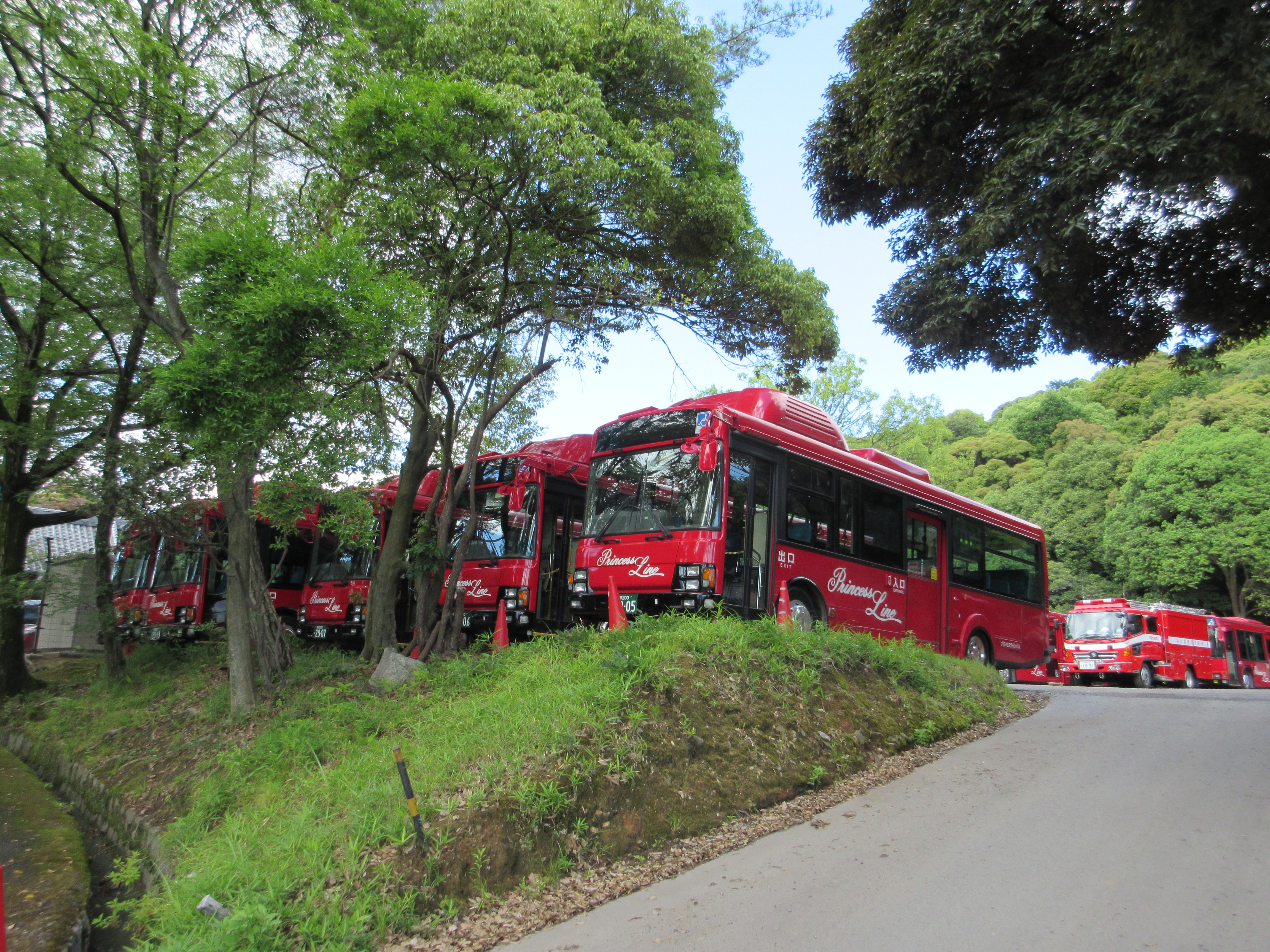 エルガミオのCNG車です(もと大阪市交通局車両)